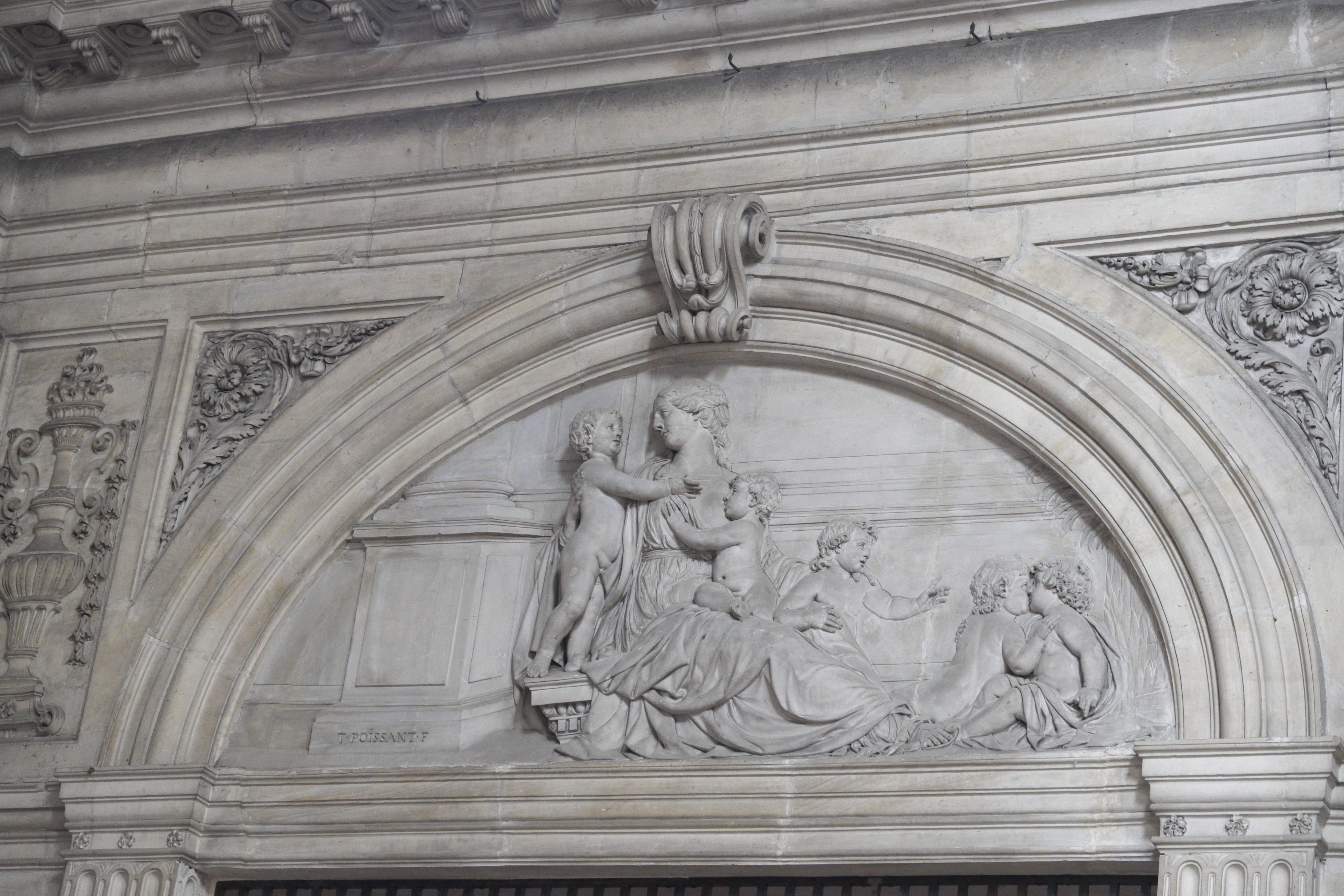 Kapelle Saint-Joseph, ehemalige Kapelle des Ordens von der Heimsuchung Mariens (Chapelle de la Visitation) in Moulins im Département Allier (Auvergne-Rhône-Alpes/Frankreich), Stuckdekor